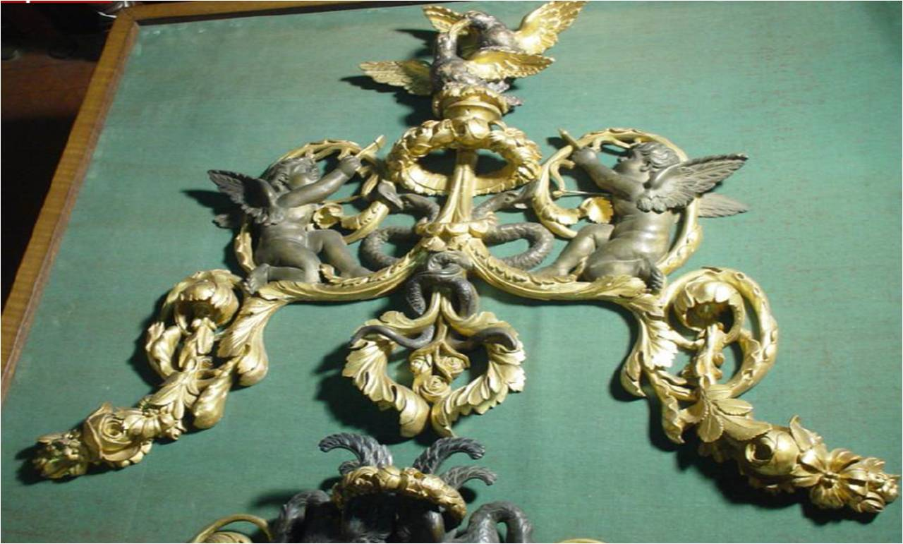 Llit